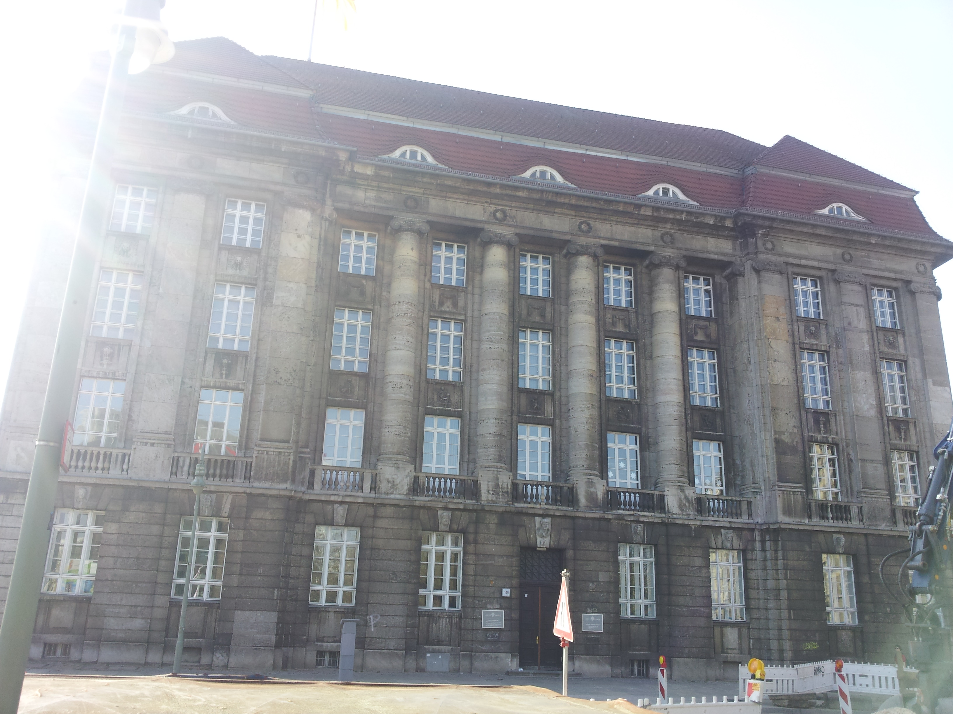 Das Gebäude der Bestsabelschule am Rolandufer berlin